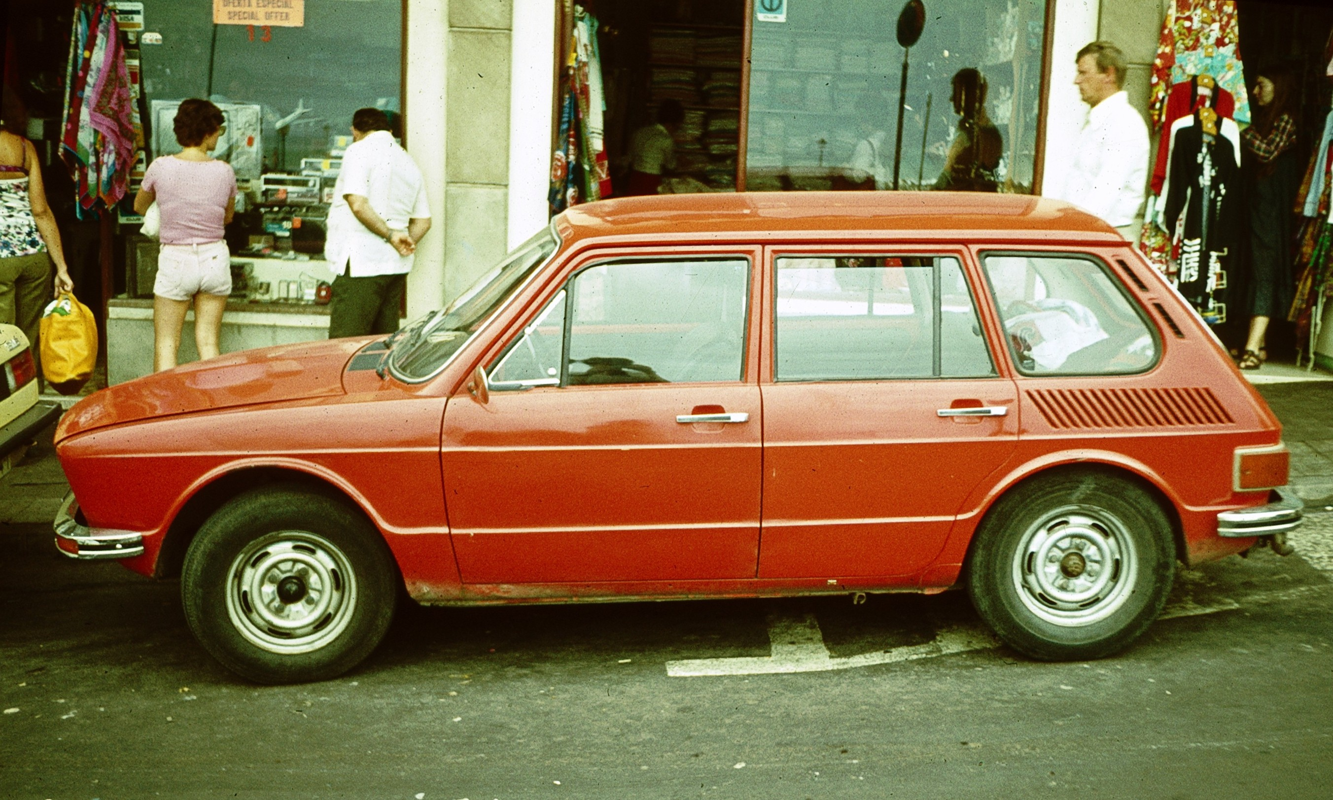 Volkswagen Brasilia 5d Puerto de la Cruz